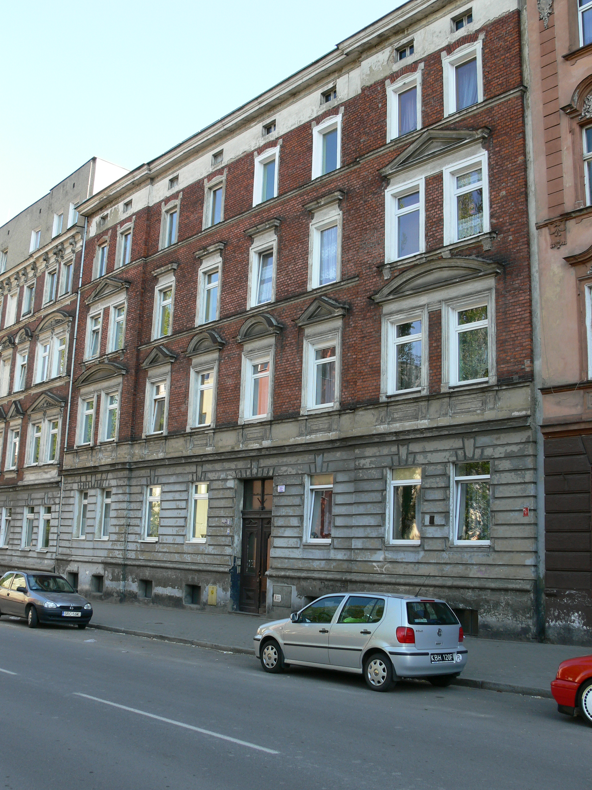 Racibórz - kamienica przy ul. Staszica 23